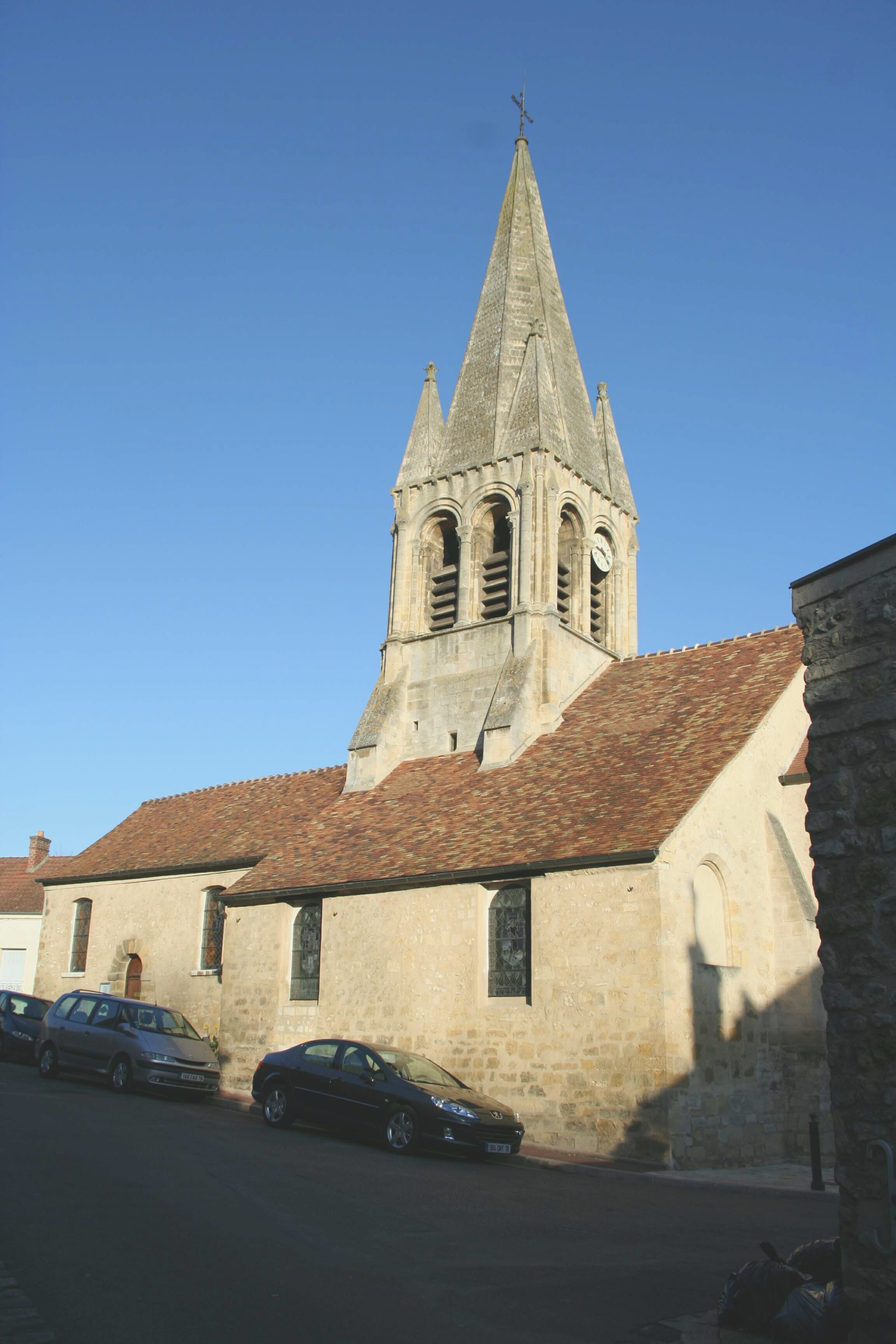 Église de Hardricourt - Yvelines (France)